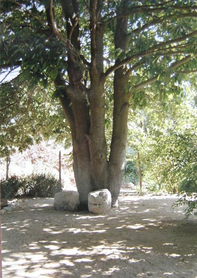 Tumba de Sebastian, en Mallarauco